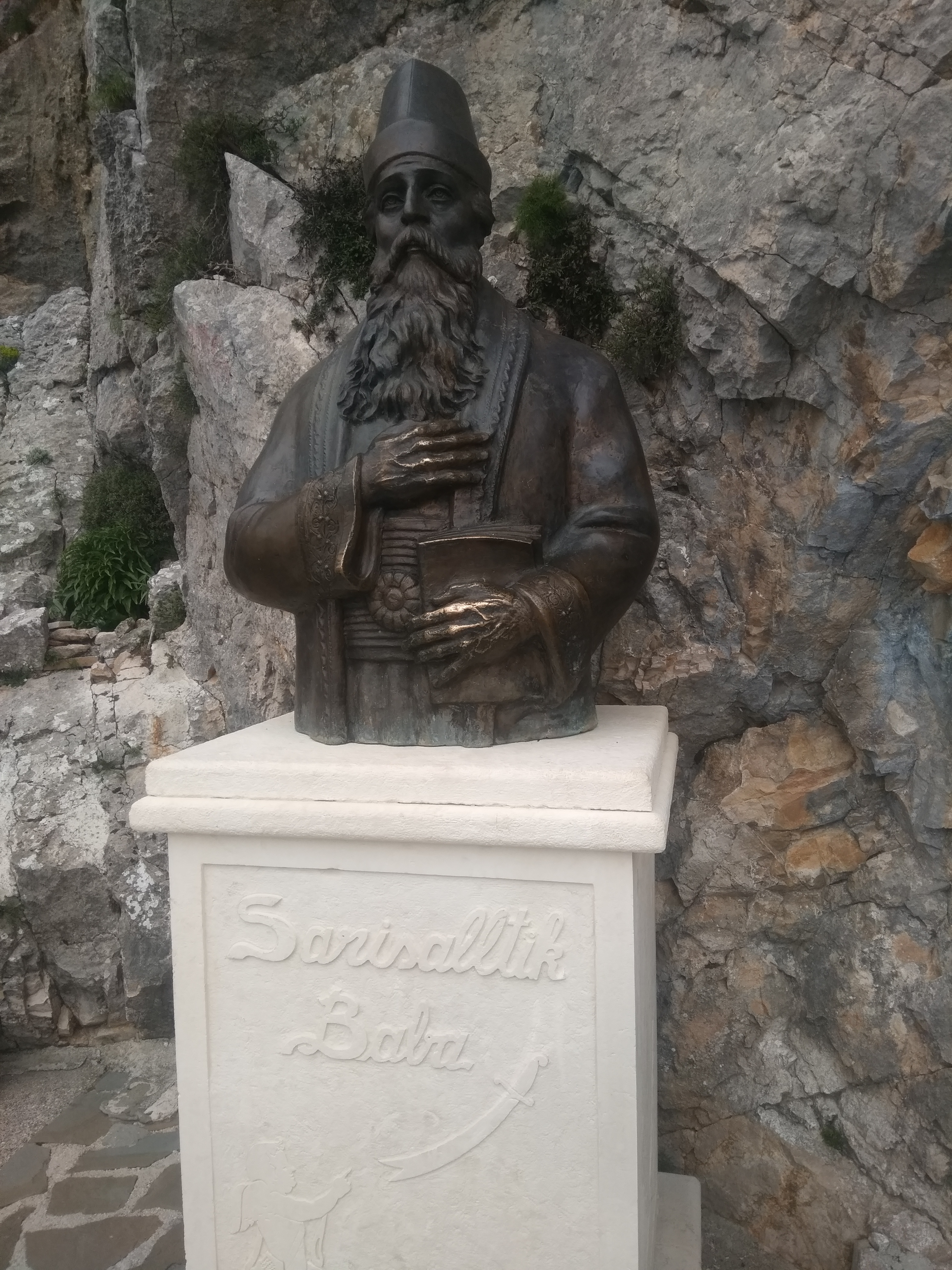 The statuje of Sarisalltik Baba in Kruje